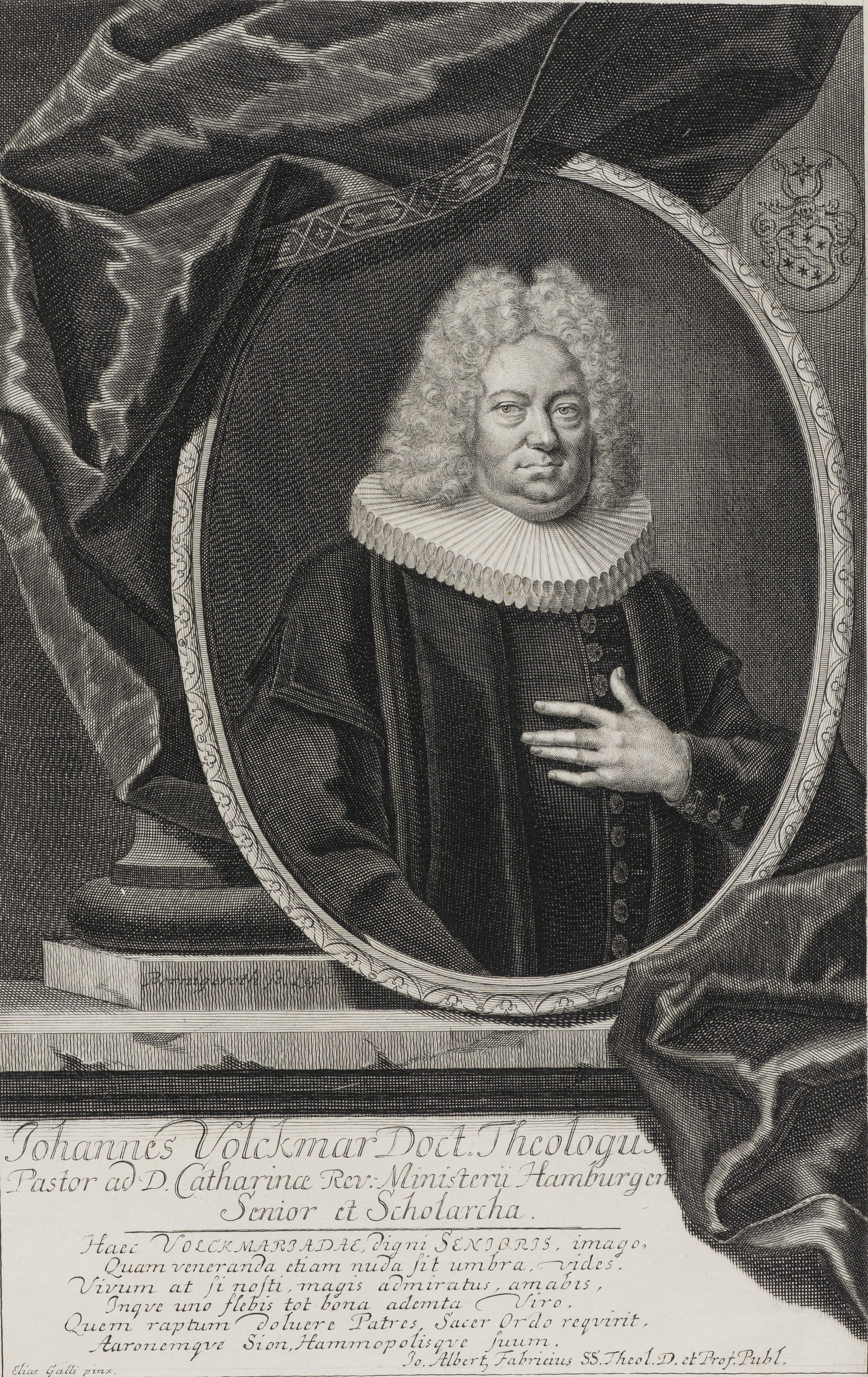 Bildnis von Johann Volckmar